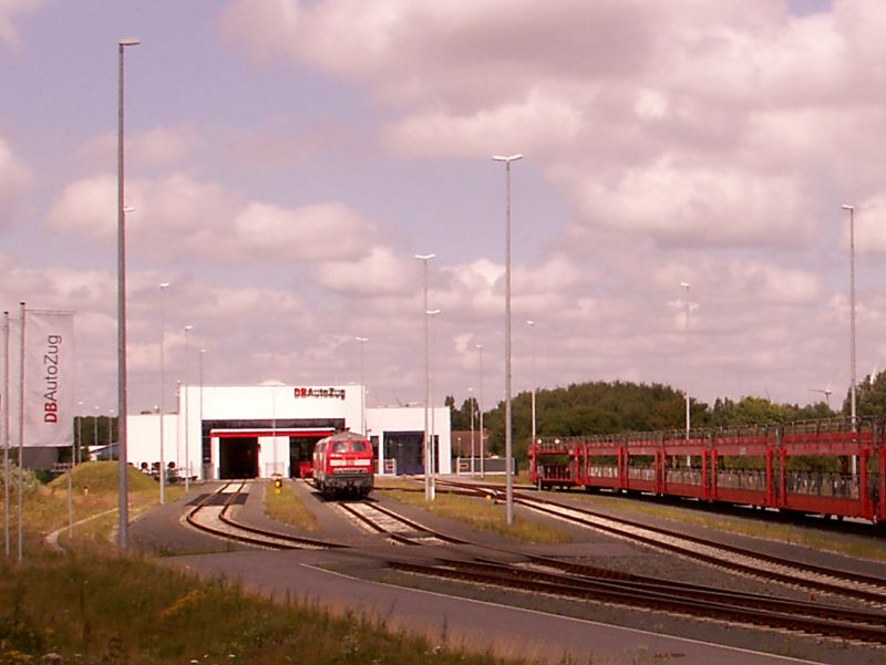 Autozug Sylt